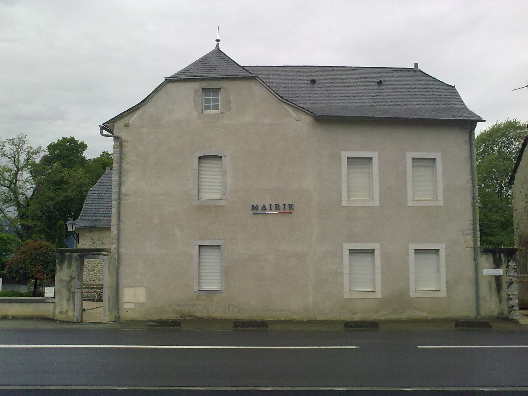 Gurmençon, France